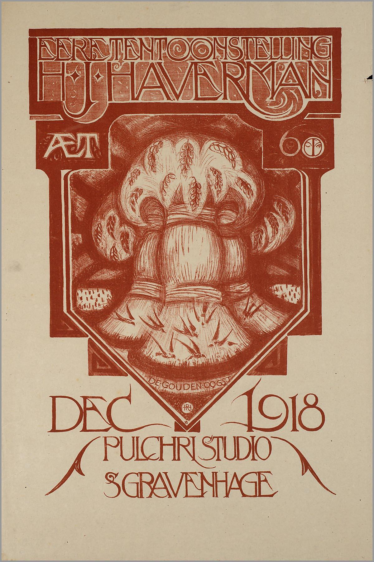 Affiche. "Eeretentoonstelling H.J. Haverman. Aet 60. De gouden oogst." Schilderkundig Genootschap "Pulchri Studio" ('s-Gravenhage).